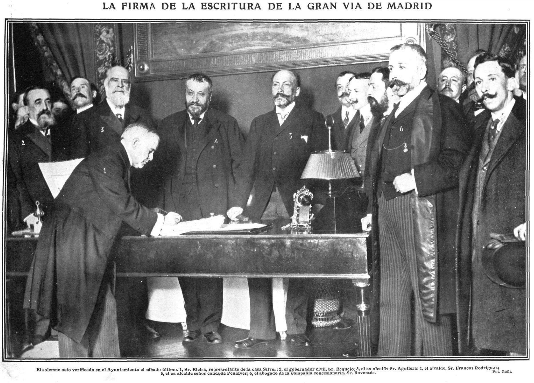 La firma de la escritura de la Gran Vía de Madrid. El solemne acto verificado en el Ayuntamiento el sábado último, 1. Sr. Bielsa, representante de la casa Silver; 2, el gobernador civil, el Sr. Requejo; 3, el ex alcalde Sr. Aguilera; 4, el alcalde, Sr. Francos Rodríguez; 5, el ex alcalde Señor Conde de Peñalver; 6, el abogado de la Compañía concesionaria, Sr. Raventós